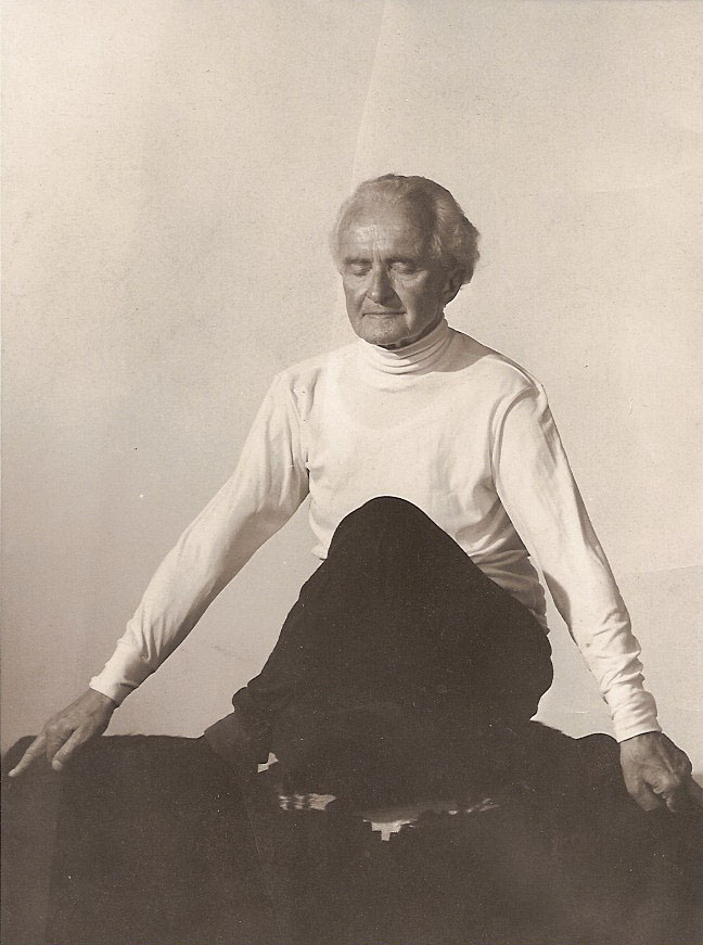 Photographie von Eugen Kuchenbuch beim Yoga